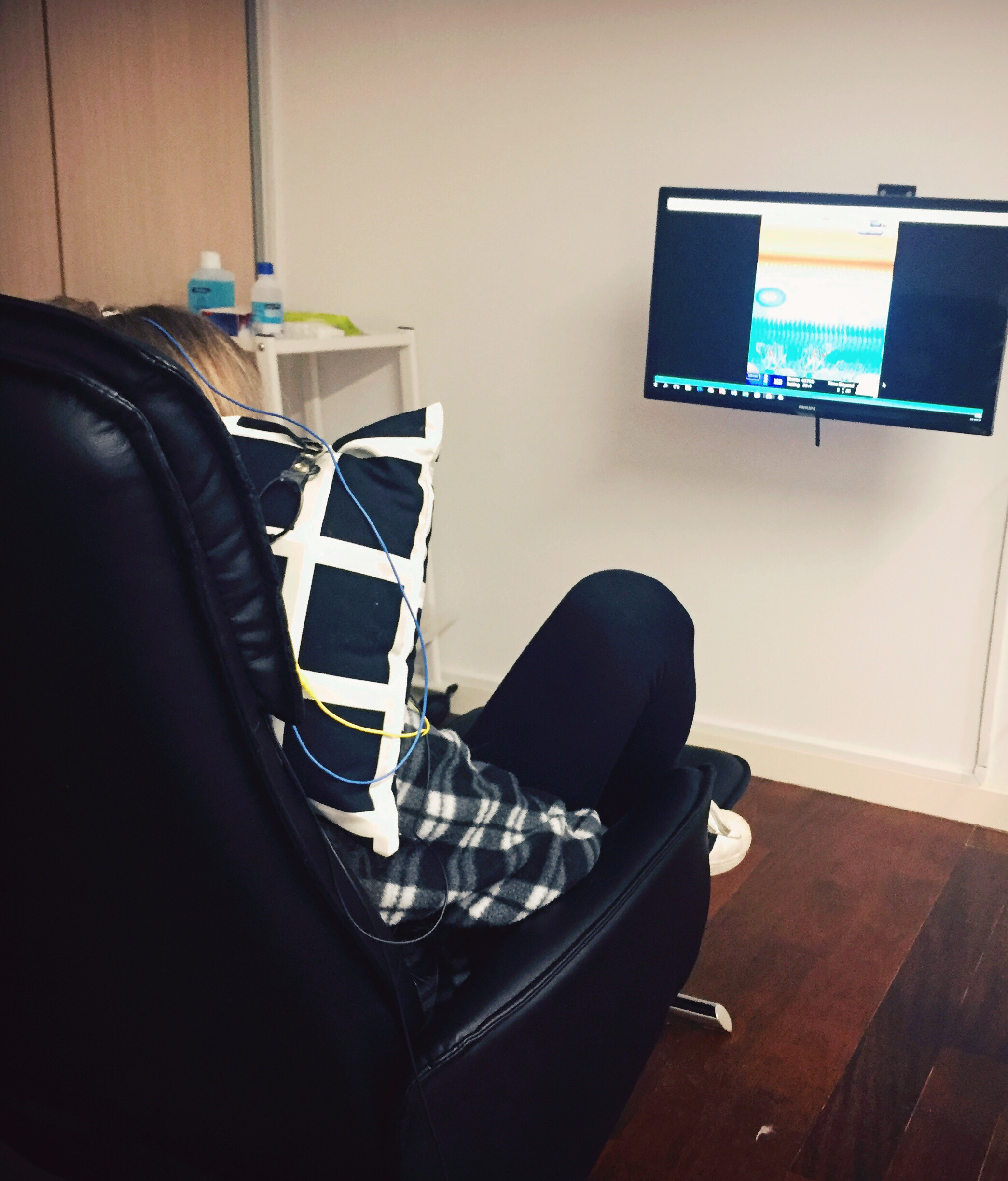 Exercício de neurofeedback cortesia da Neuropulse